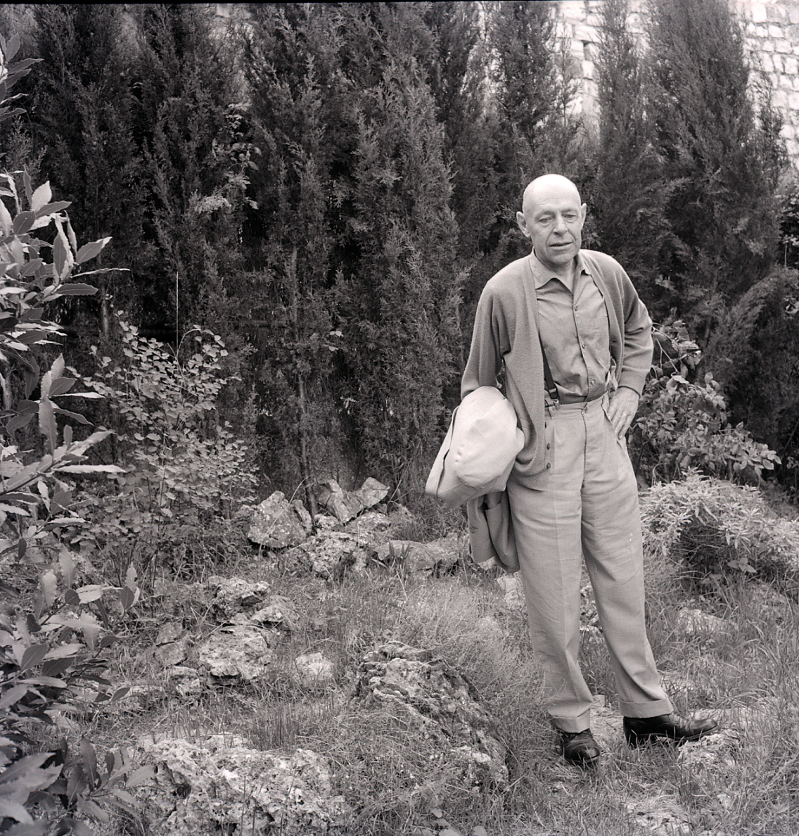 Serie fotografica : Italia, 1960 / Paolo Monti. - Buste: 7, Fototipi: 7 : Negativo b/n, gelatina bromuro d'argento/ pellicola ; 6x6. - ((Serie costituita da 7 negativi identificati con i nn.: R4995-5001. Sulla busta R4995 manoscritto: "1960/ Dubuffet". La suddetta serie è contenuta nella scatola identificata con la numerazione R4953-5160. Sul coperchio della scatola, manoscritto a pennarello: "Ritratti".